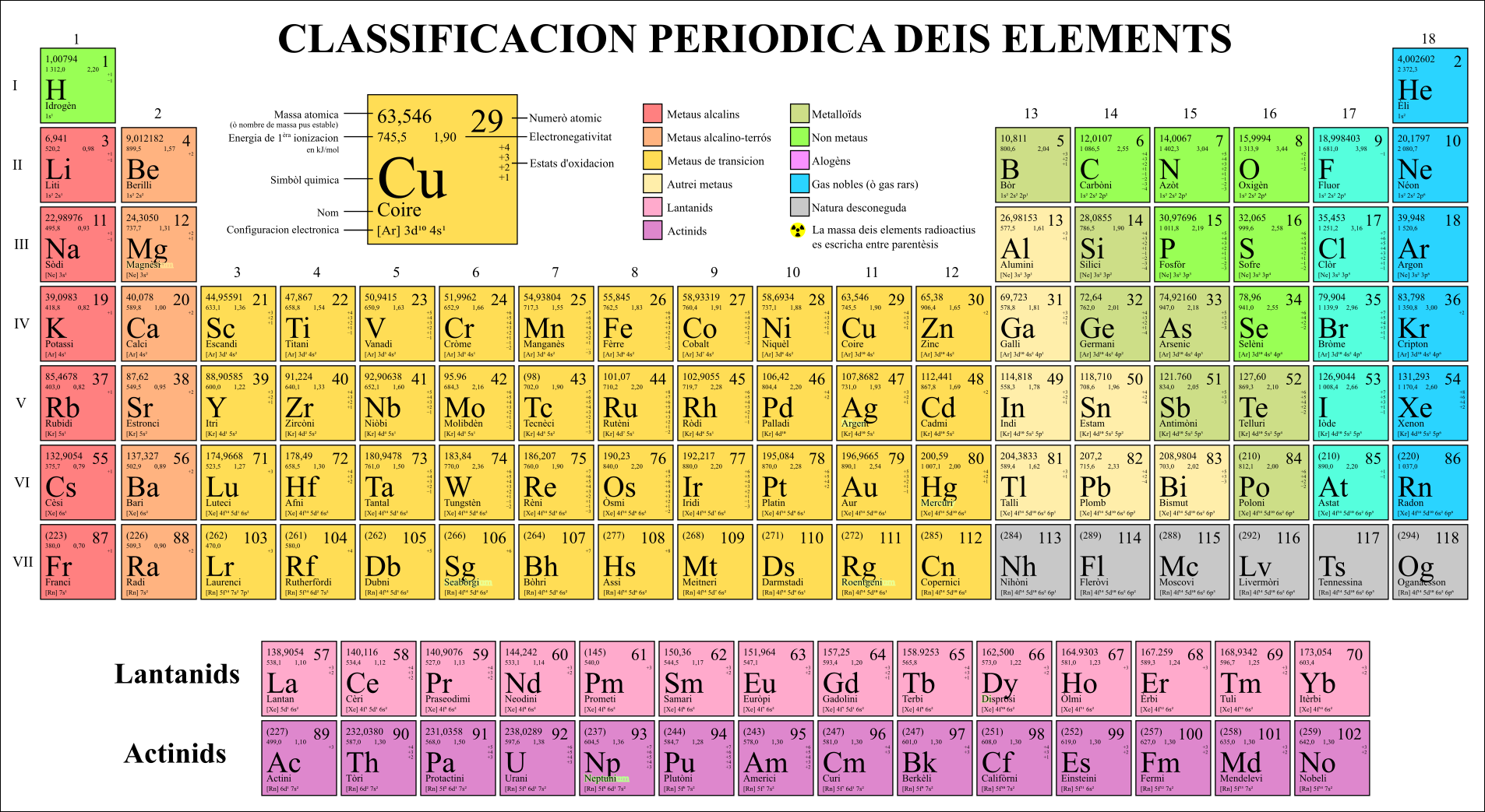 Classificacion periodica deis elements